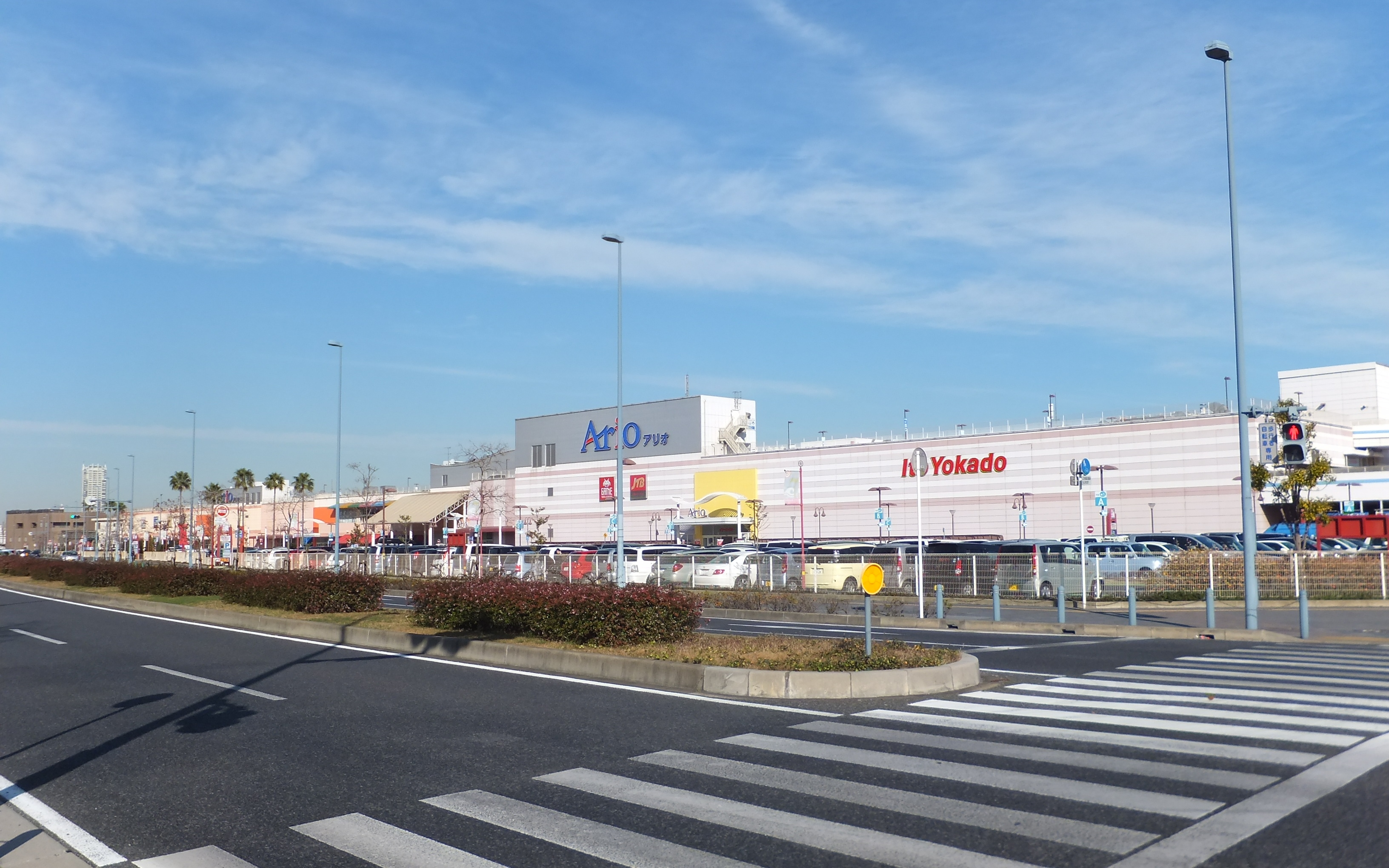 千葉市中央区の蘇我地区にある再開発地区・ショッピングモールハーバーシティ蘇我・アリオ蘇我店。イトーヨーカドーが運営する大型ショッピングモールブランド「アリオ」の第1号である。